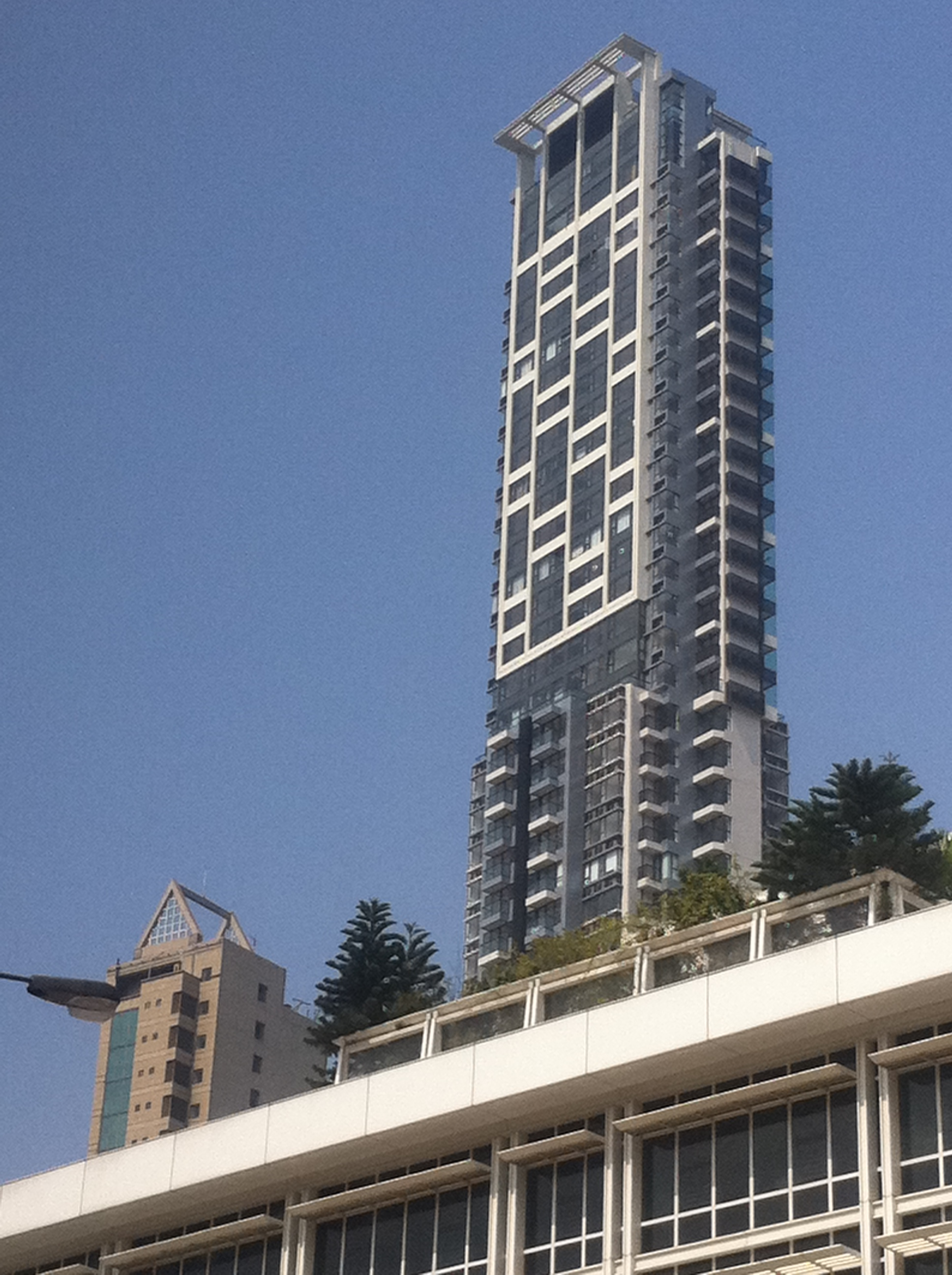 中文（香港）: 灣仔zh:皇后大道東望zh:莘峰